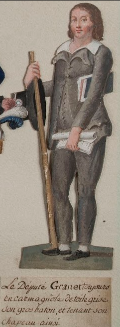 Le Député Granet toujours en carmagnole de toile grise son grand baton et tenant son chapeau ainsi.